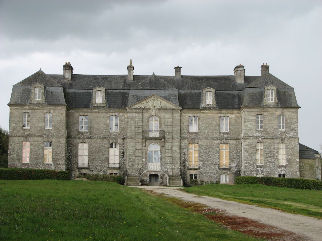 Das Schloss Trégranteur in Guégon